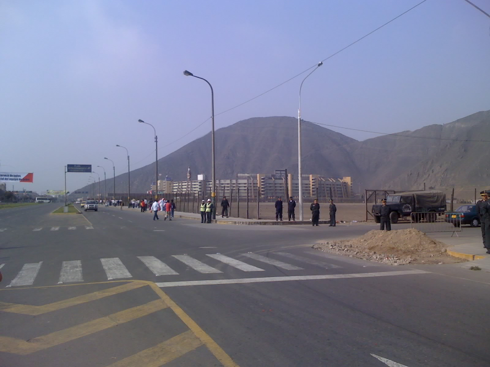 Vista del estadio monumental de Lima